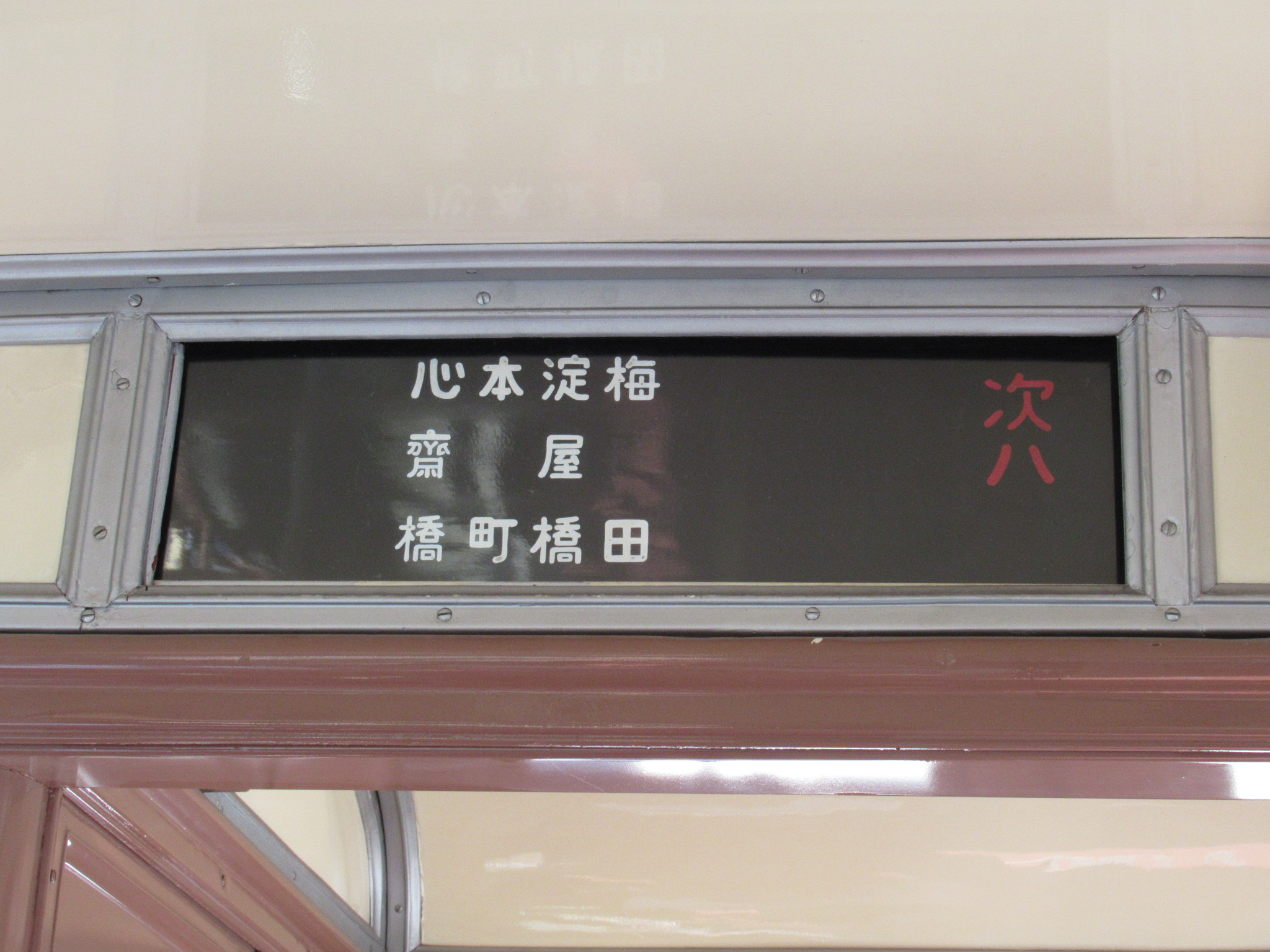 大阪市営地下鉄 105号駅名表示器